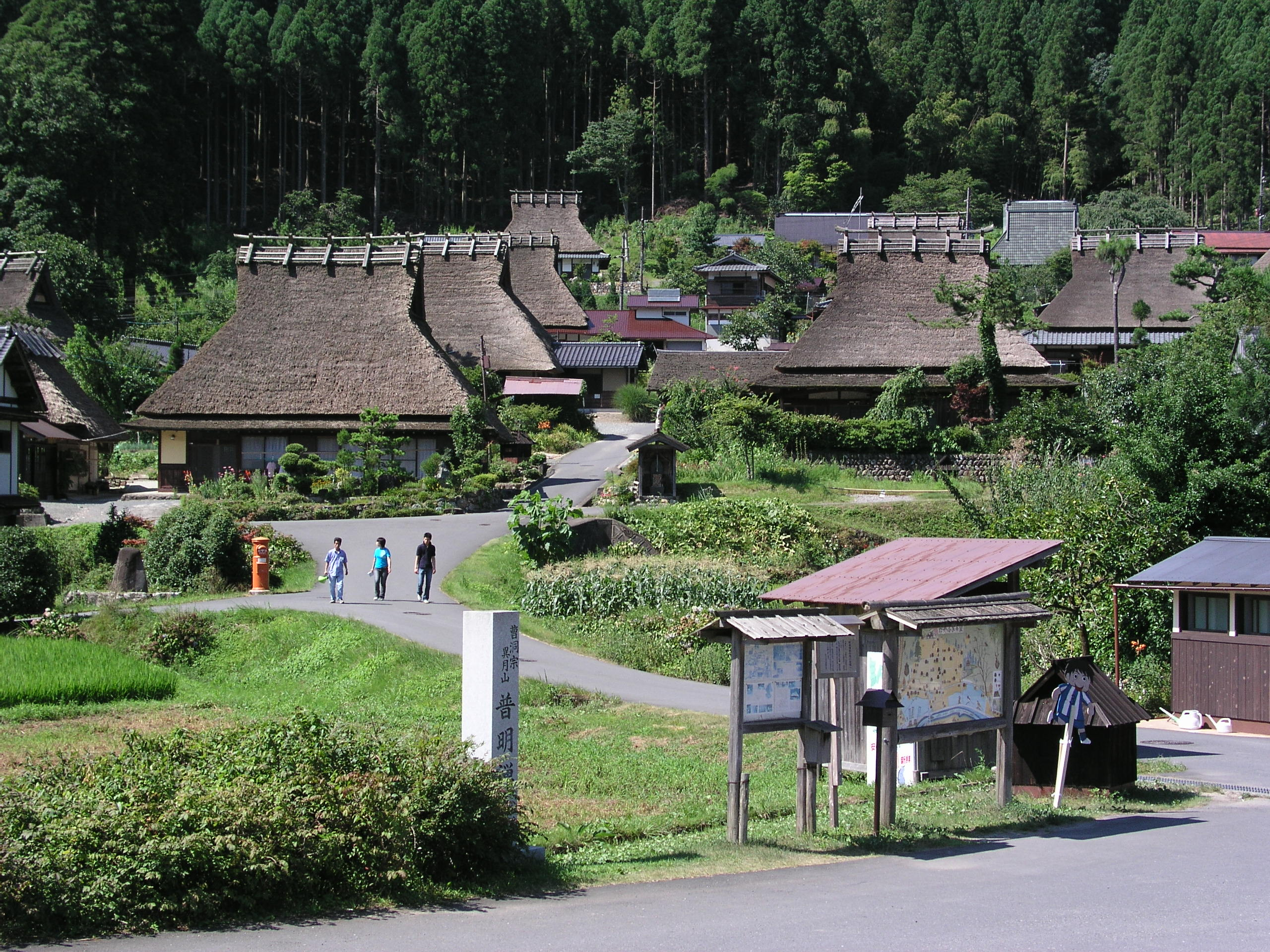 Yao Kayabukinosato in Nantan, Kyoto, Japan